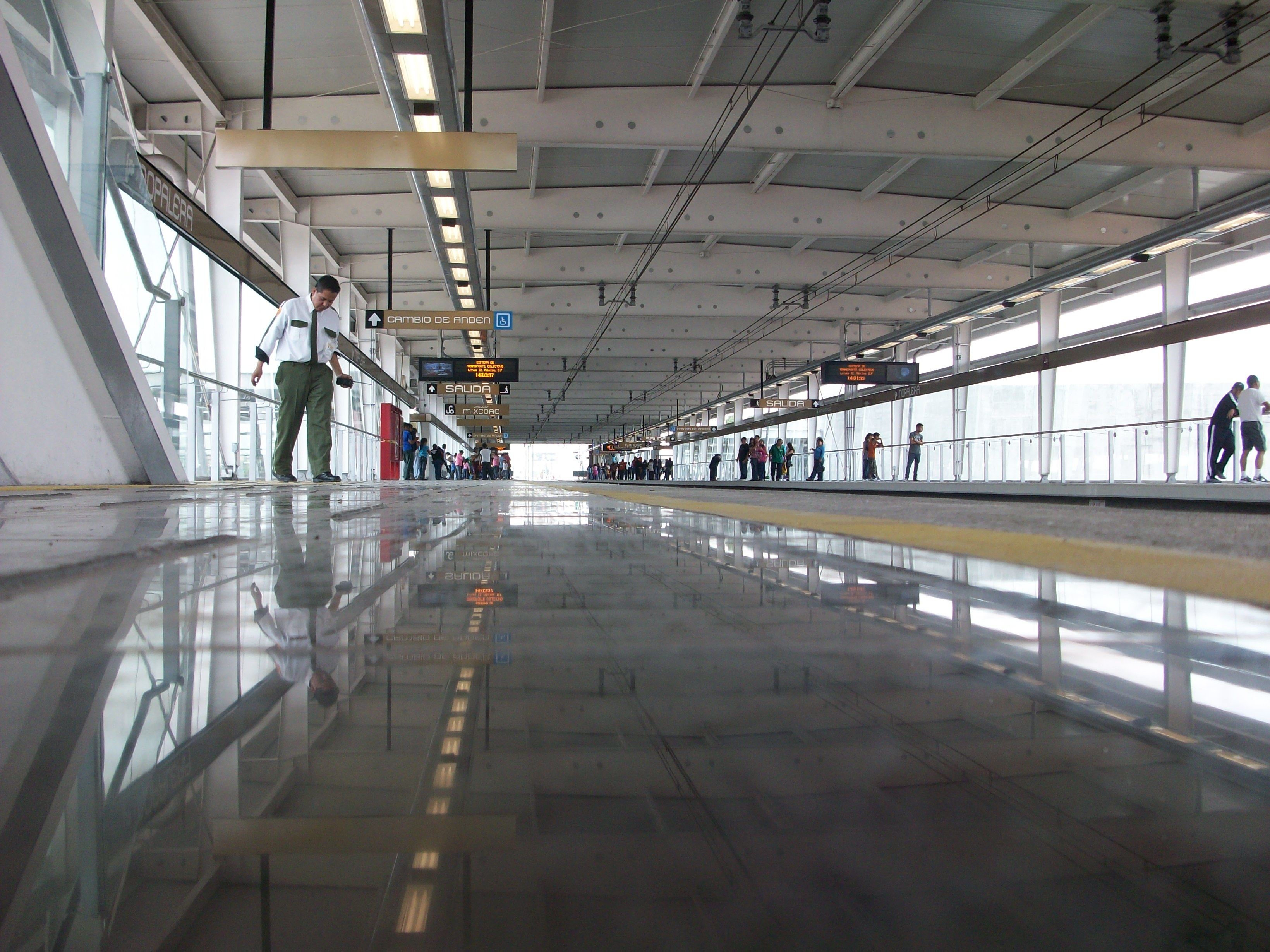 Anden estacion nopalera